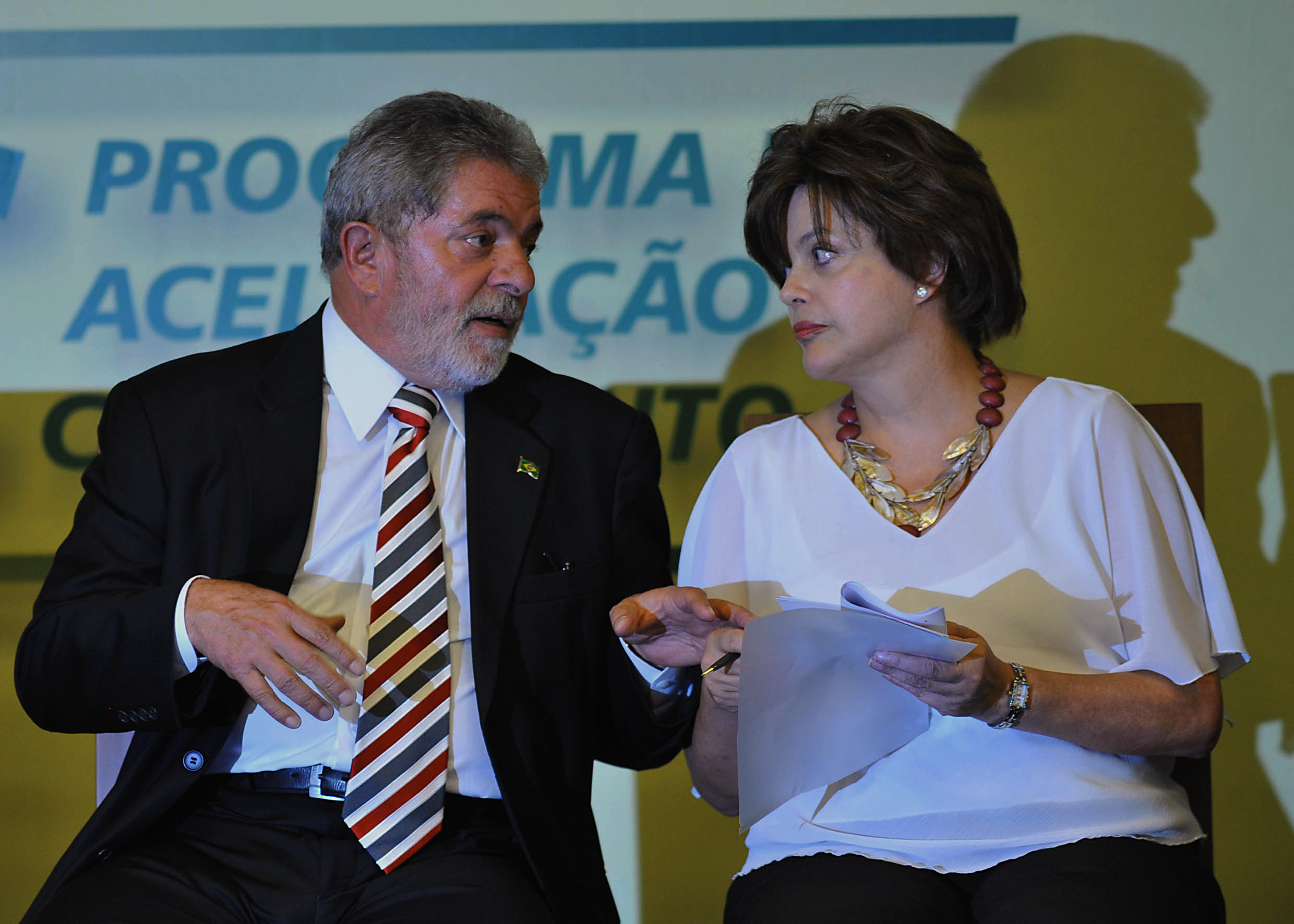 A Chefe da Casa Civil da Presidência da República, Dilma Rousseff e Lula.